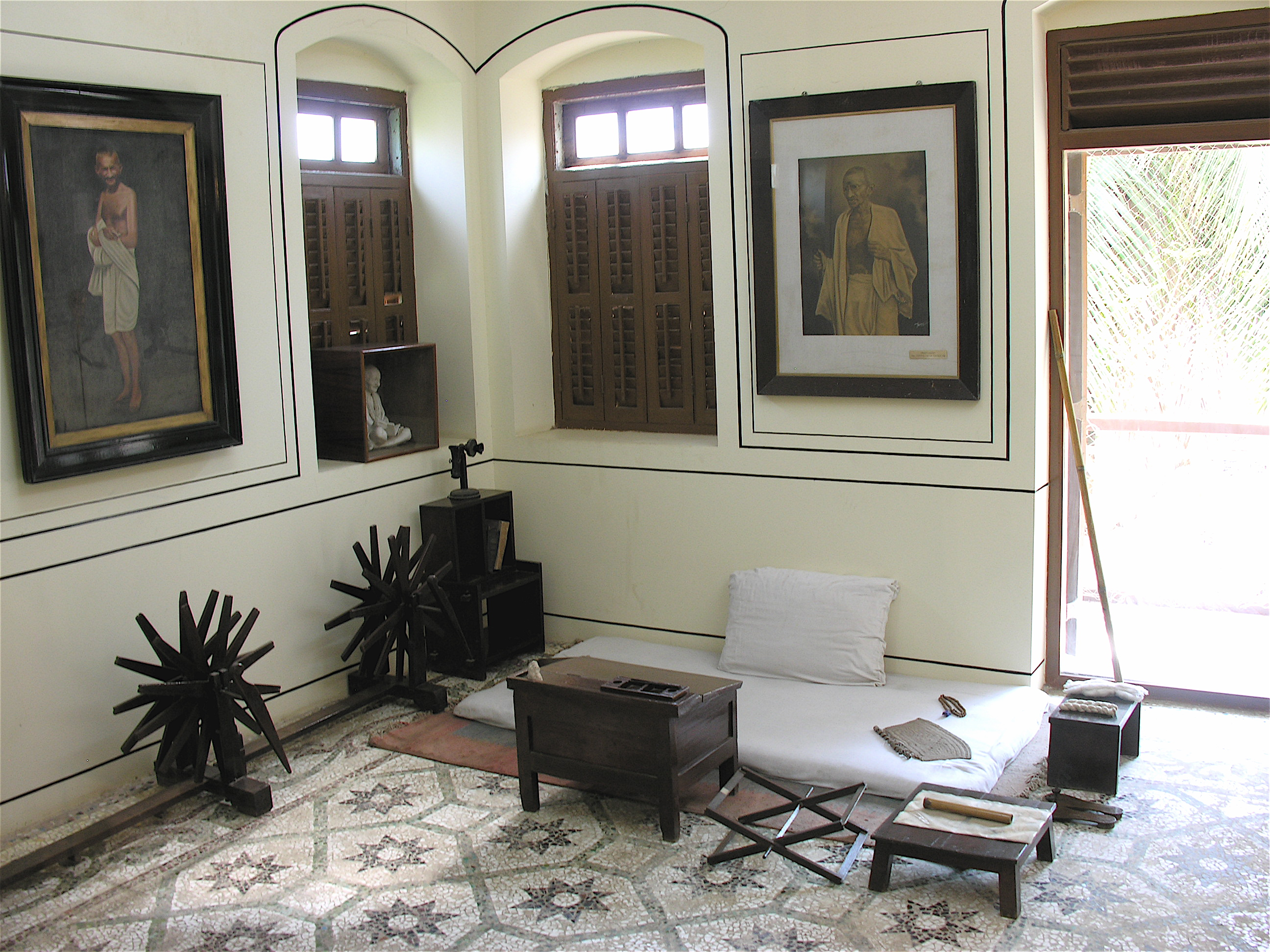 Inside Gandhi's Bombay Residence